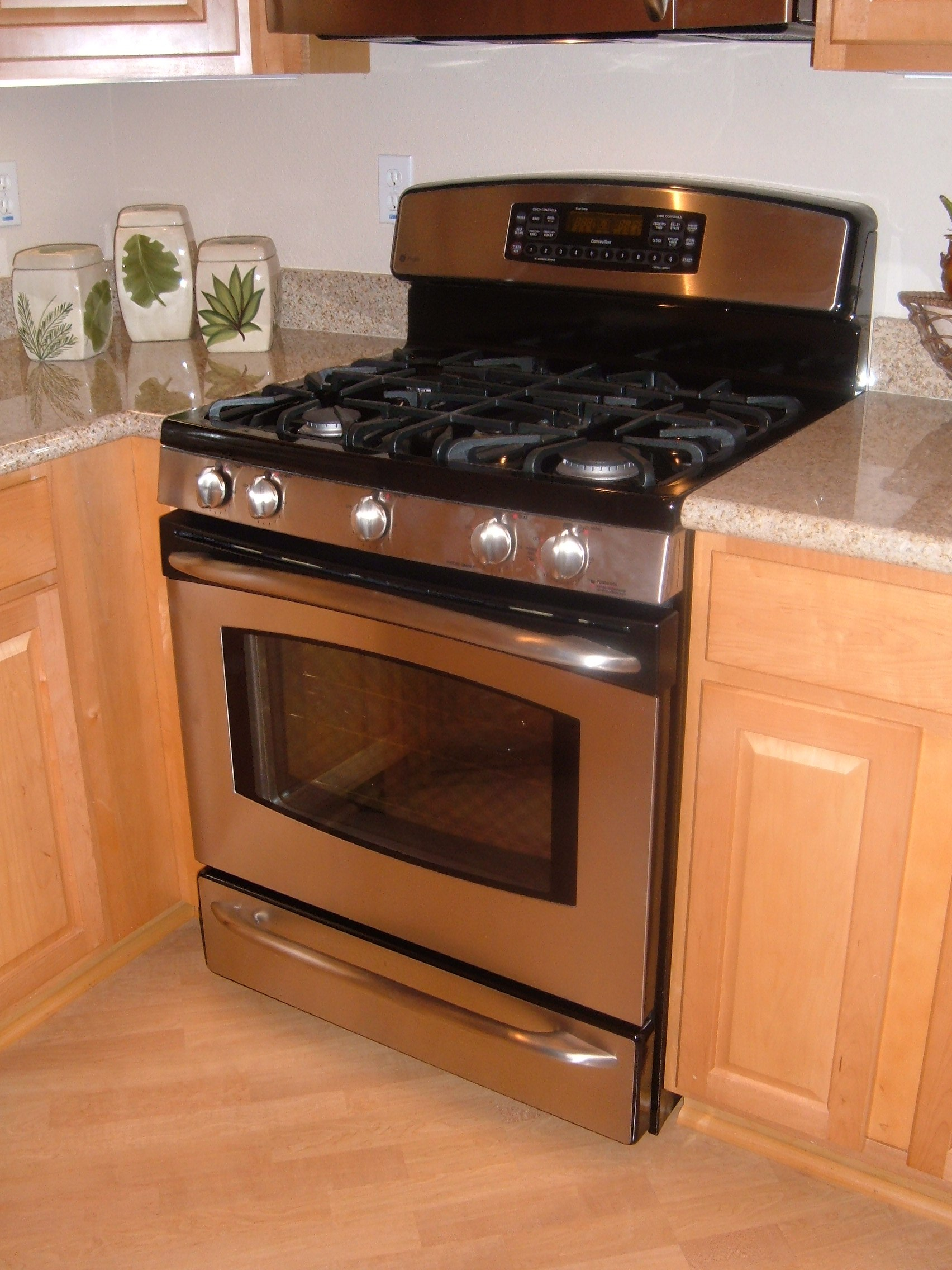 General Electric Profile stove